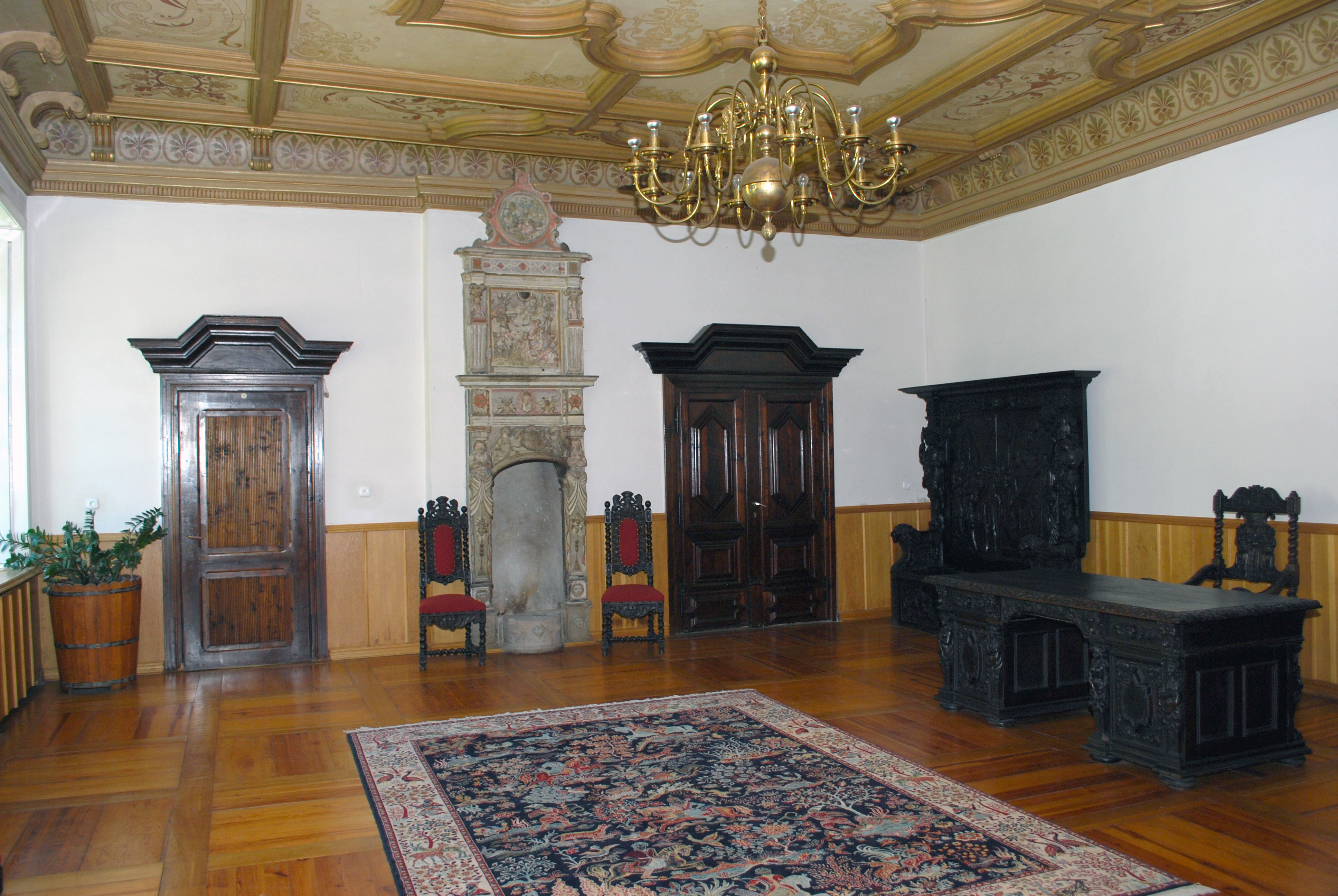 Sala dębowa pałacu w Waplewie Wielkim